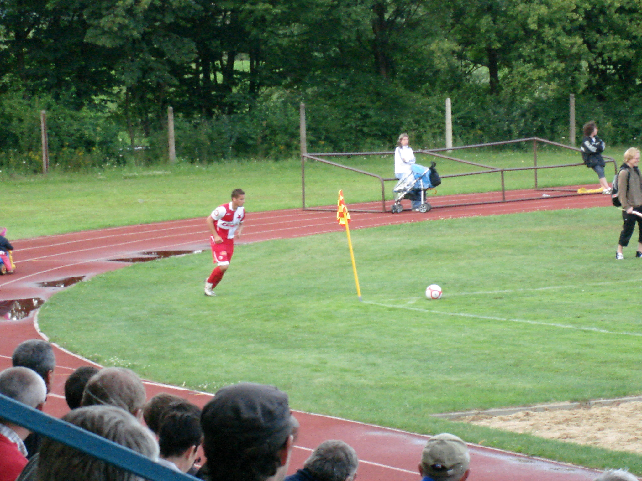 fotbalový turnaji v Nové Včelnici 7.7.2009 - Ladislav Volešák bude kopat roh